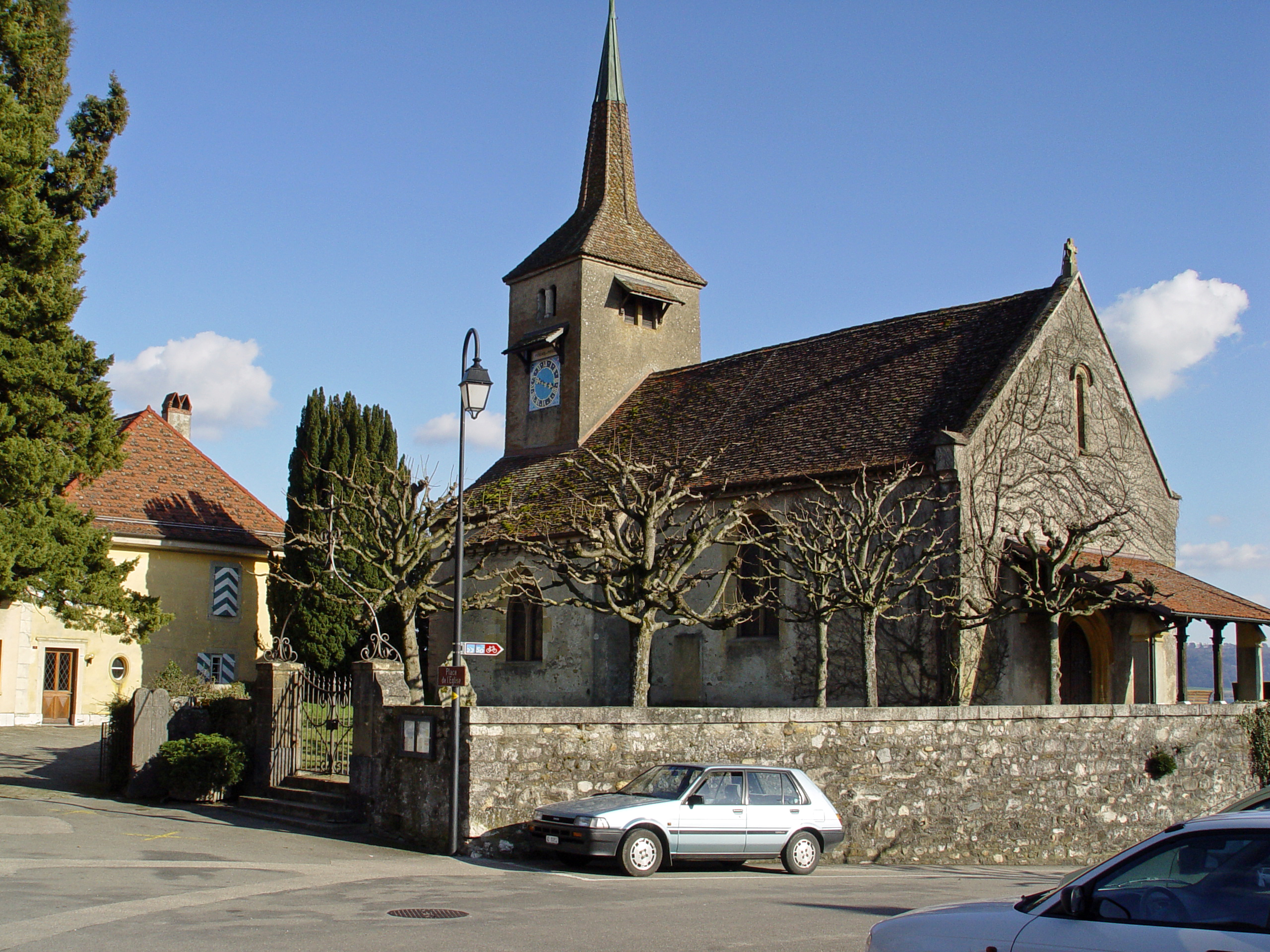 Kirche von Concise (Schweiz)